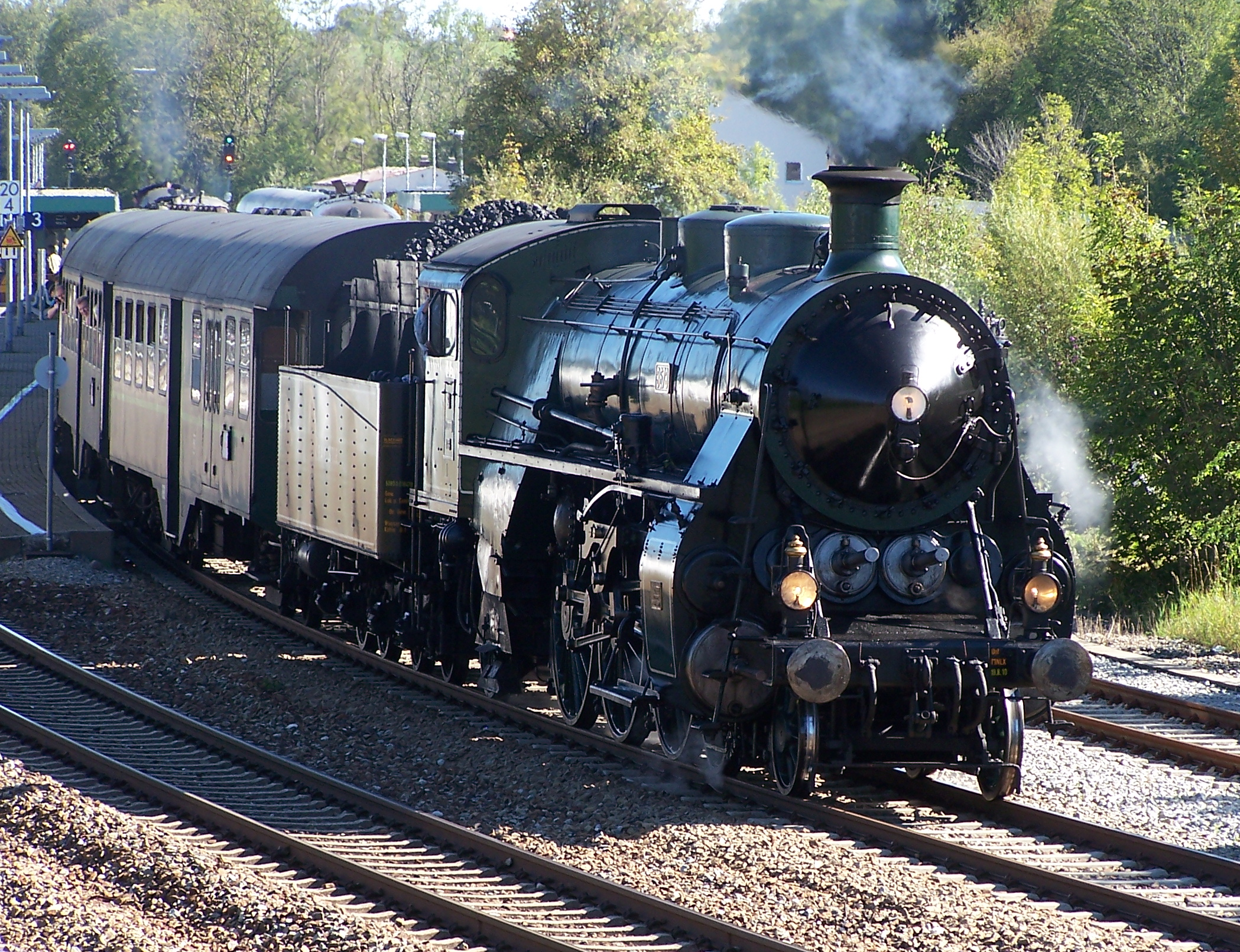 S3/6 Ausfahrt Bahnhof Kaufbeuren Richtung Lindau